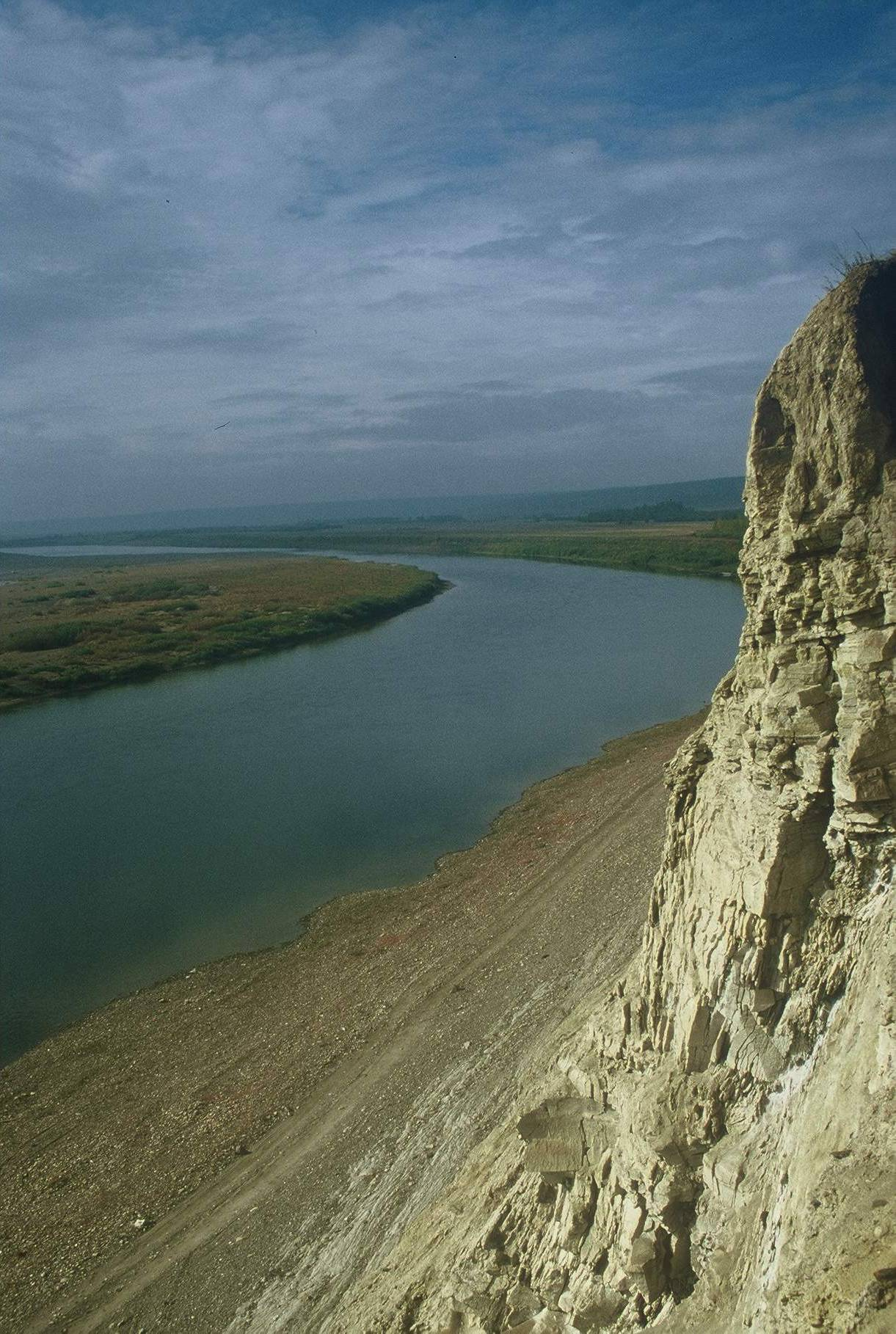 Blick auf die Amga in Jakutien (Russland)